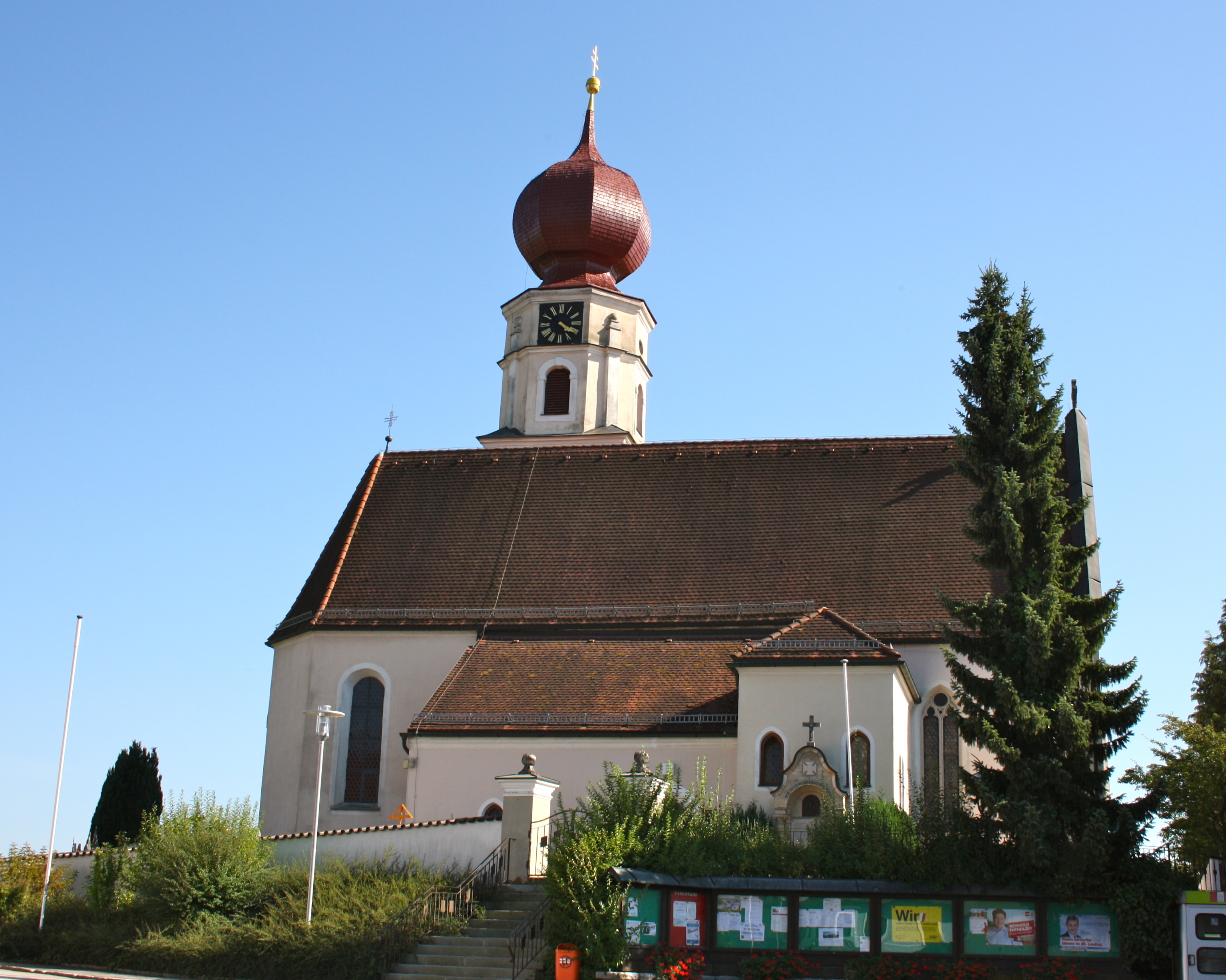 Kath. Pfarrkirche hll. Petrus und Paulus sowie Friedhof